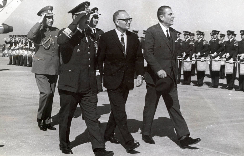 1967. Eduardo Frei volviendo a Chile luego de la visita oficial a Brasil, se aprecia a Edmundo Pérez Zujovic y autoridades militares